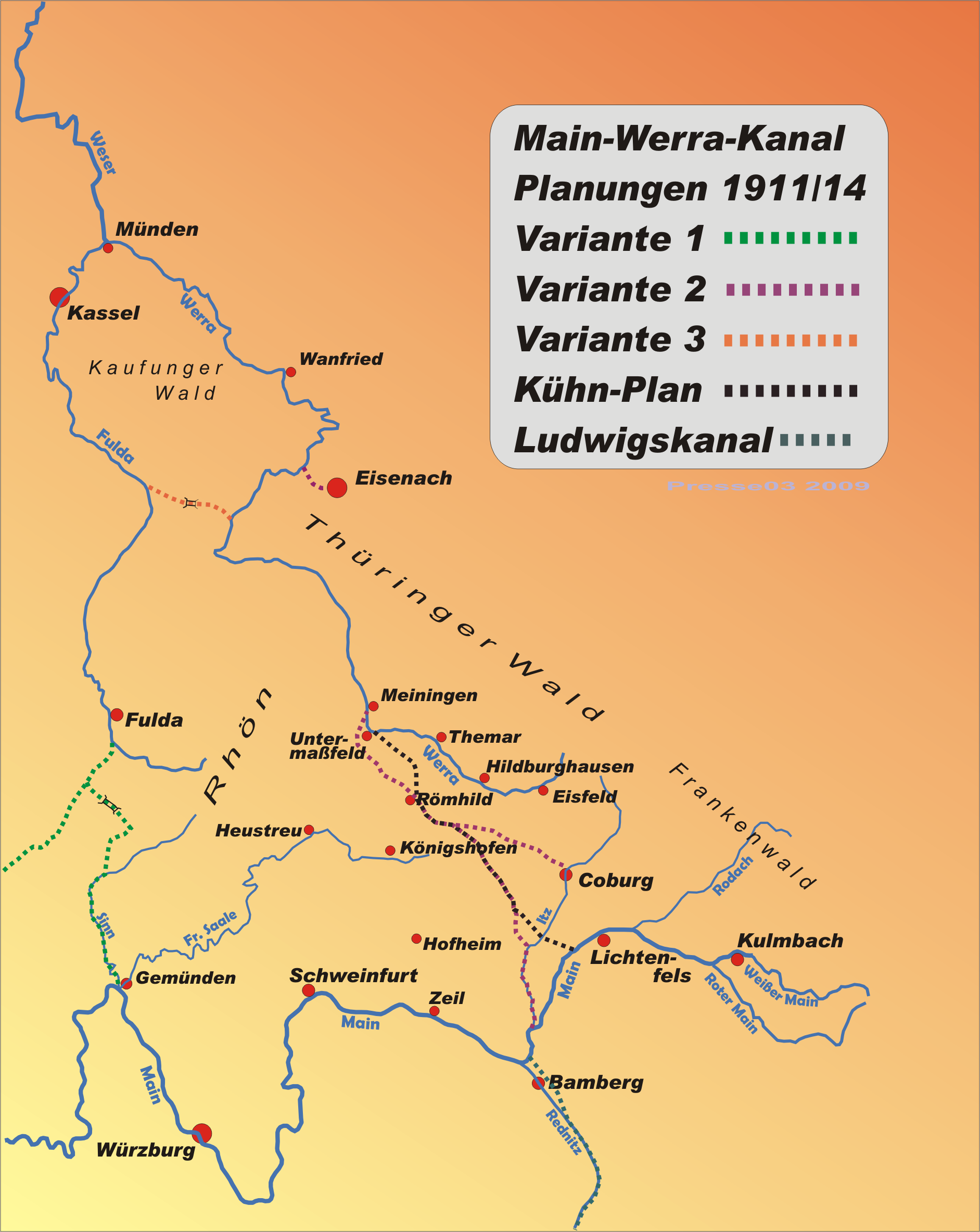 Planungen von Contag und Kühn einer Schiffsverbindung zwischen Main und Werra 1911 bis 1914